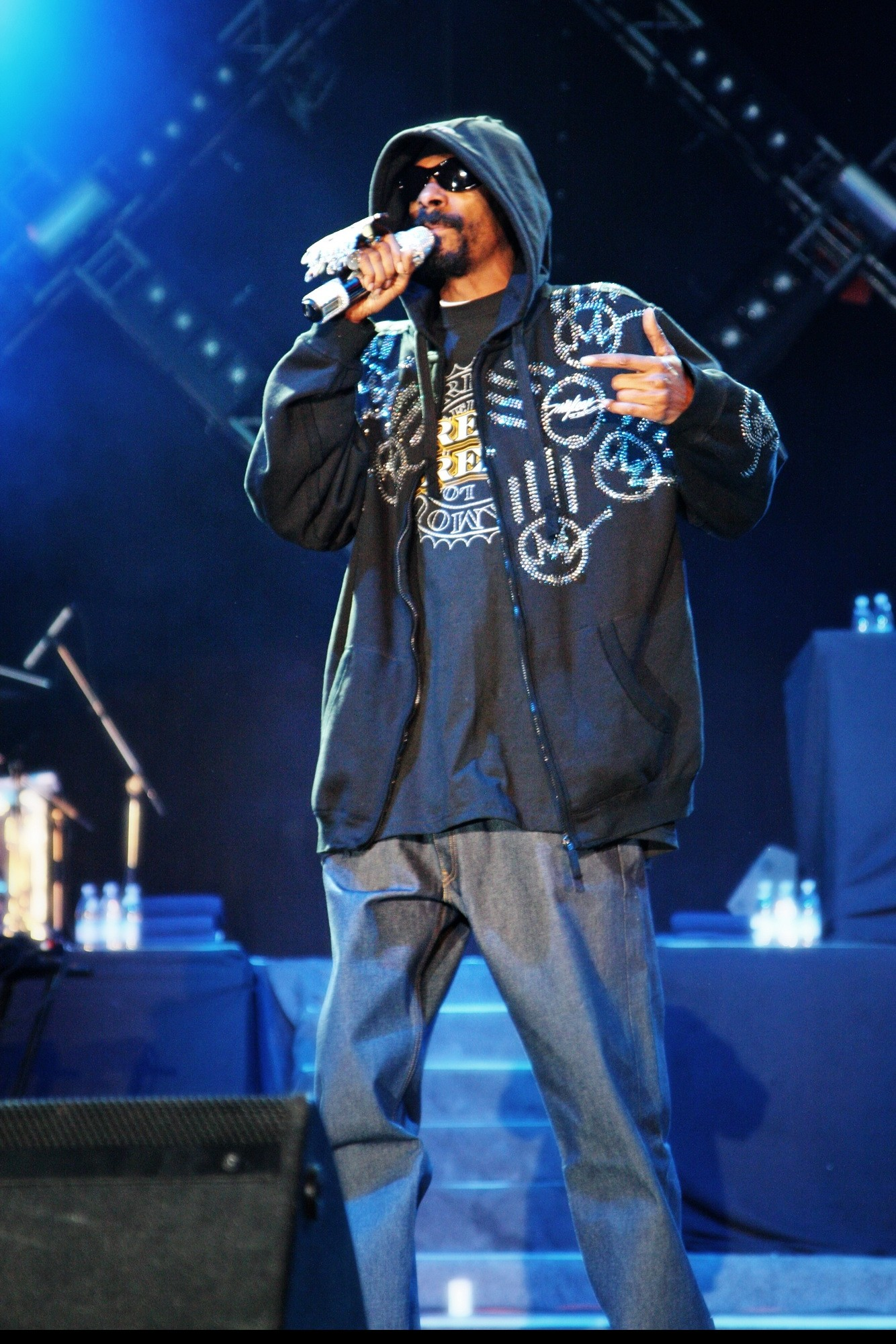 Concert Snoop Dogg, Bucuresti, Arenele Romane. Super concert